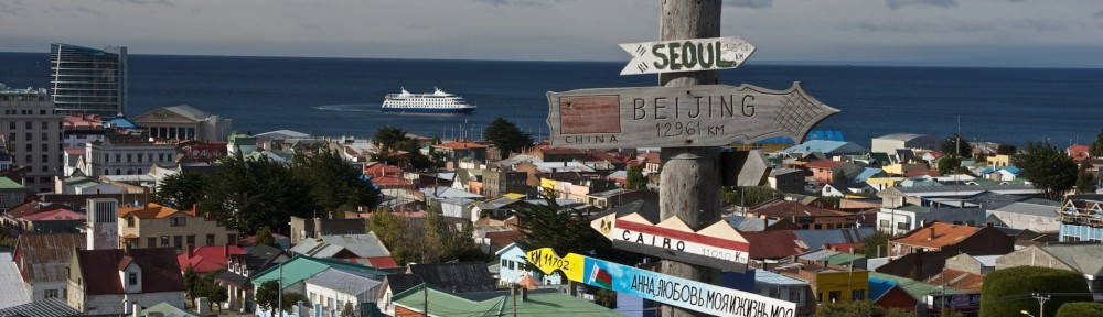 Vista desde el cerro de la Cruz ,con las flechas de distancia a ciudades del mundo, uno de los iconos de la ciudad.